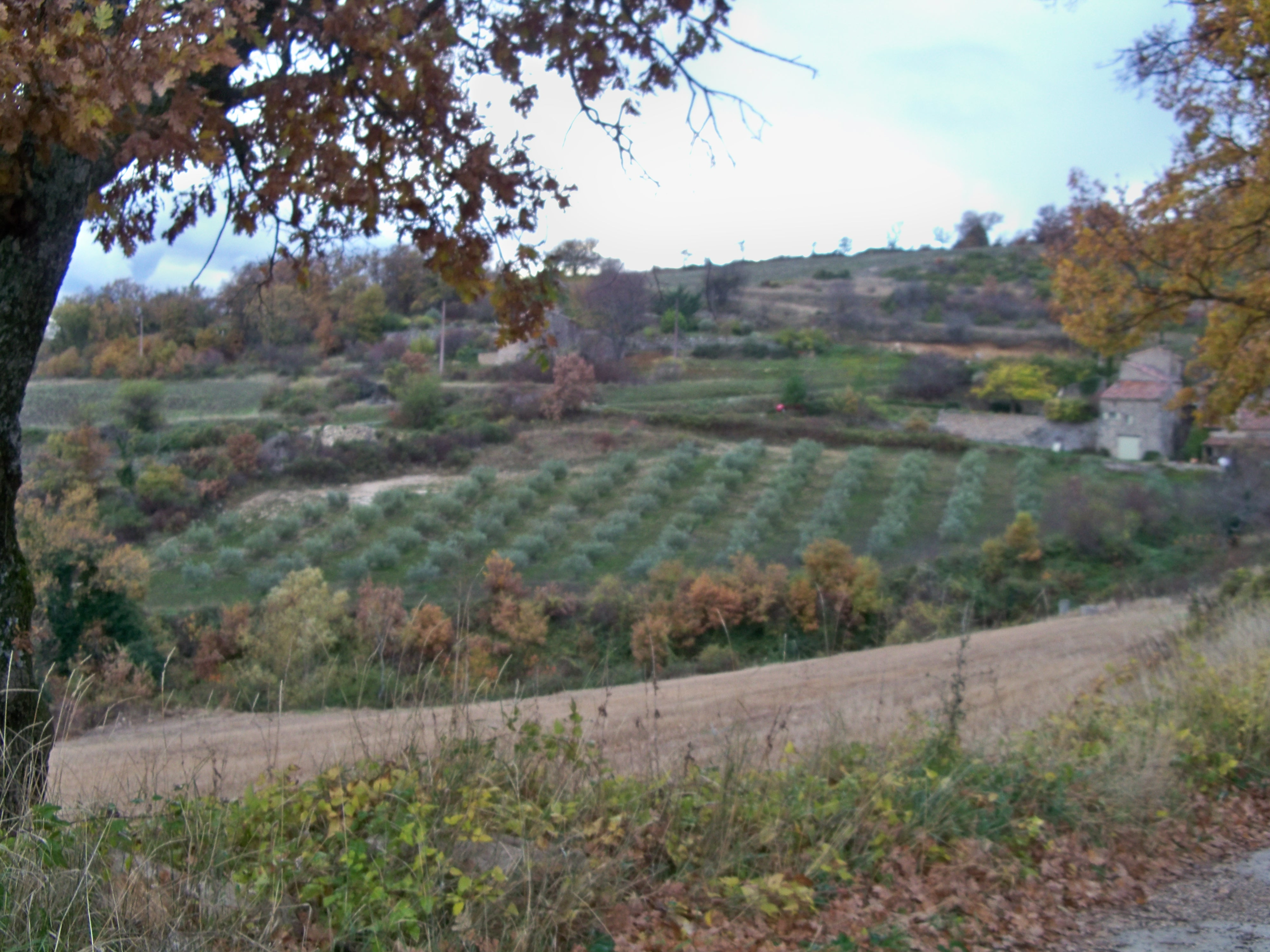 Oliveraie à Ste Croix à Lauze (04)